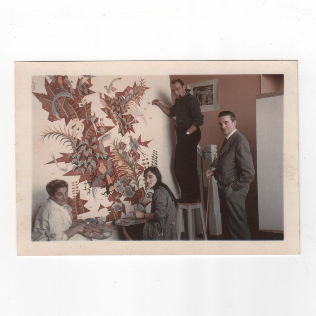 Pierre Lardin supervisant le travail d'une peinture, dans son atelier de l'école des beaux-arts de Bordeaux. Deux élèves de l'école et son épouse à gauche travaillant sur cette peinture.